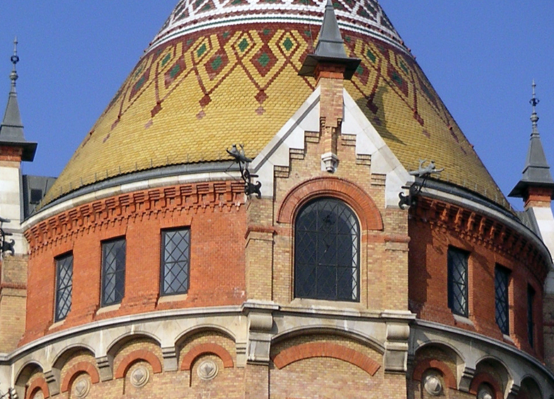 Historischer Wasserturm in Wien Favoriten, fotografiert durch Peter Binter, 1. November 2005